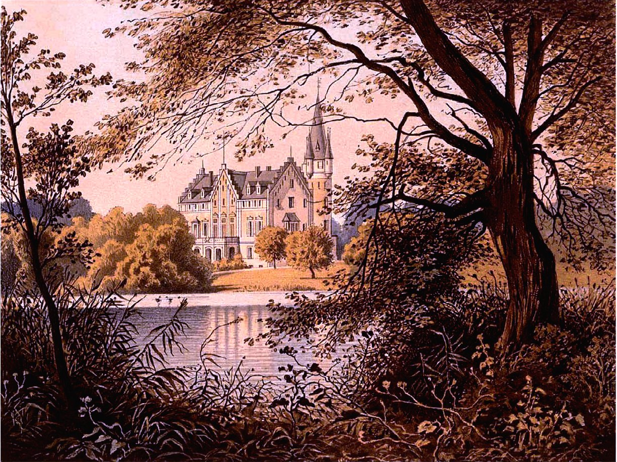 Schloss Runowo, Kreis Wirsitz, Lithographie aus der Sammlung Duncker